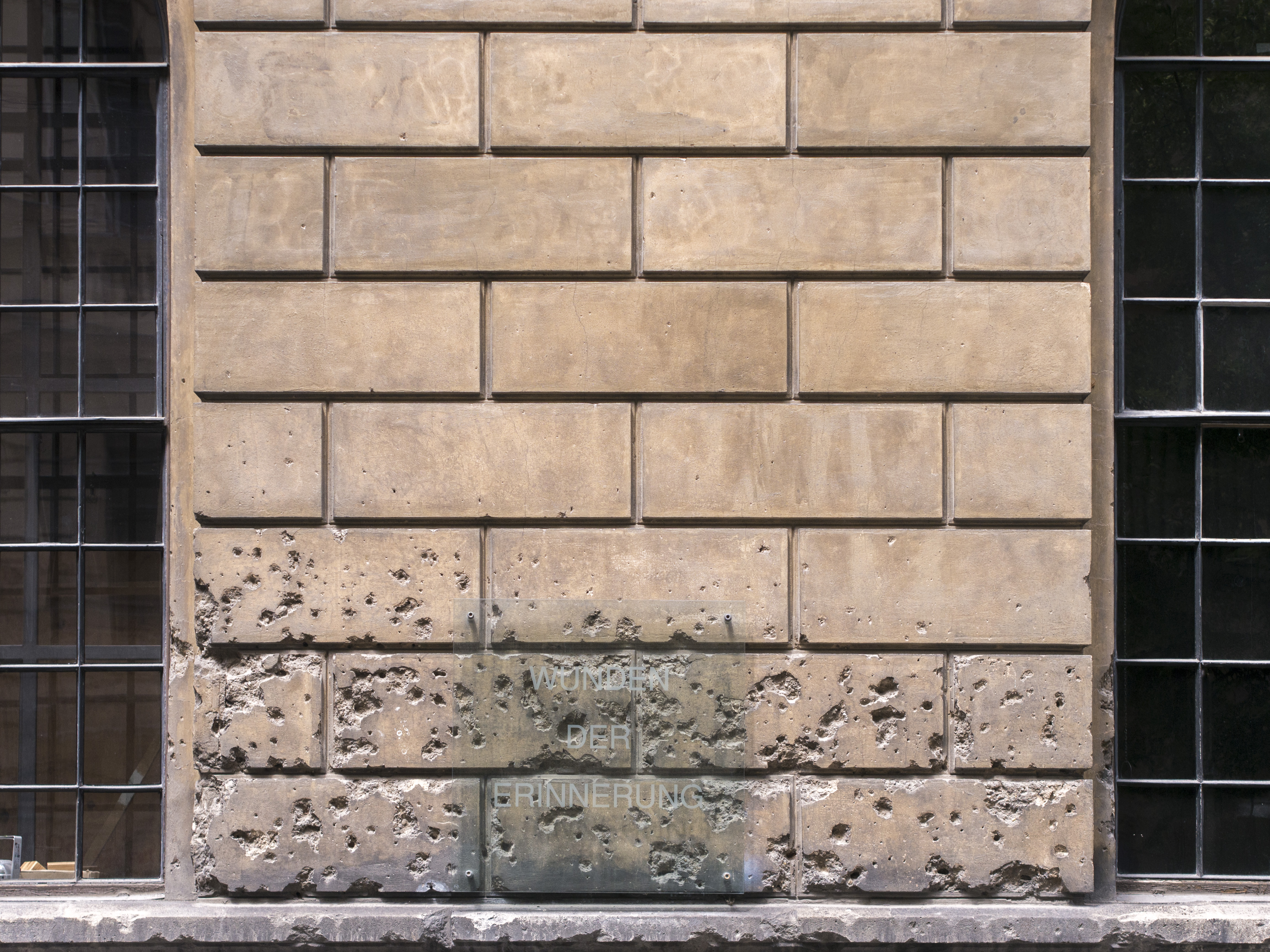 Semperdepot Einschusslöcher Gekennzeichnet Wunden der Erinnerung